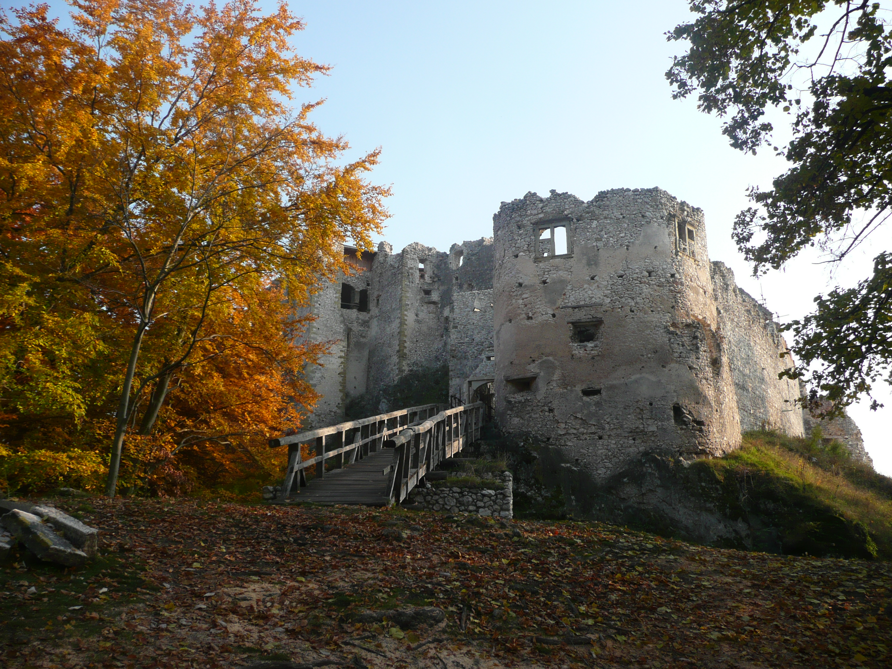 Jeseň na Uhrovskom hrade